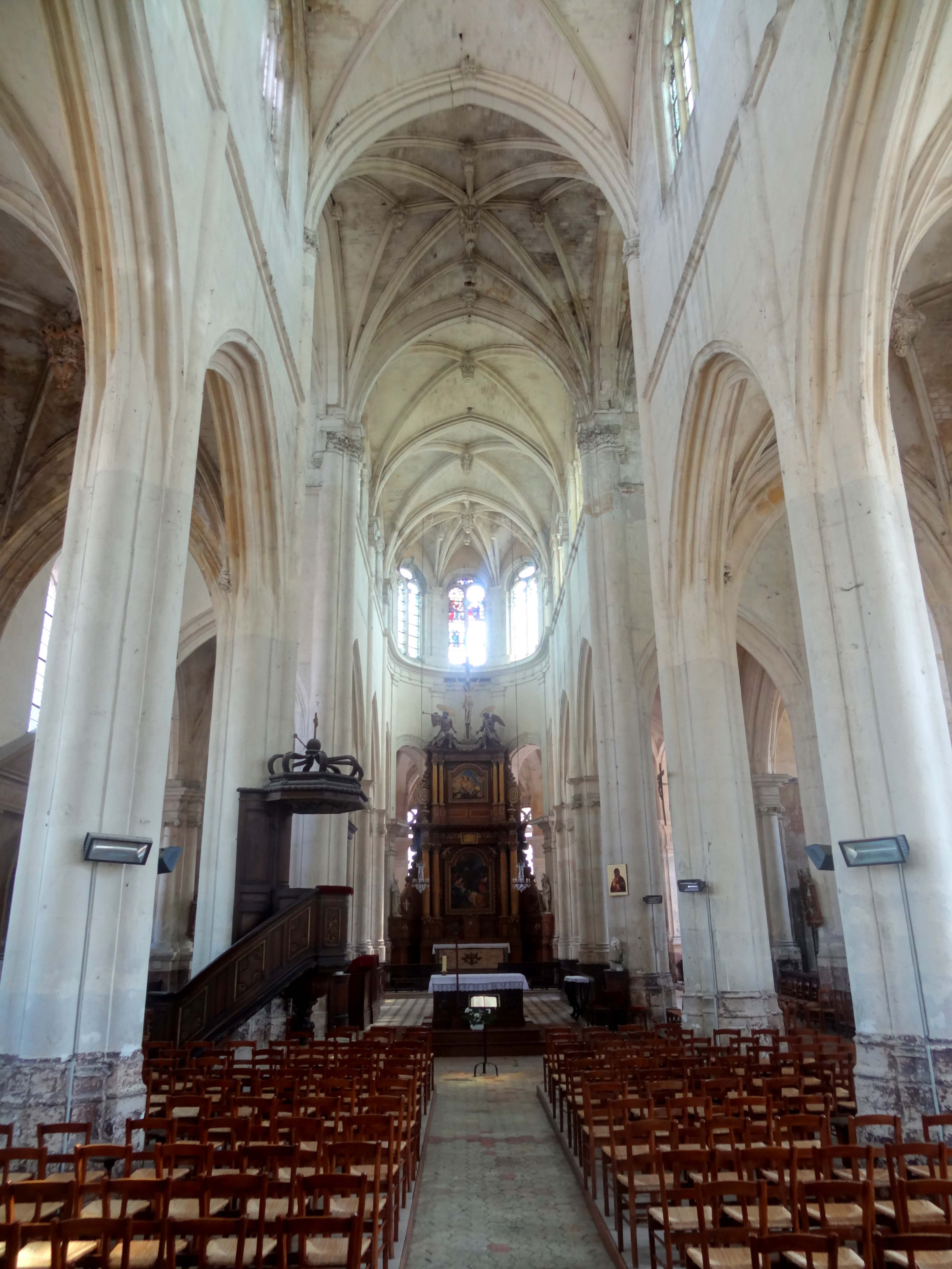 Intérieur de l'église - voir titre.